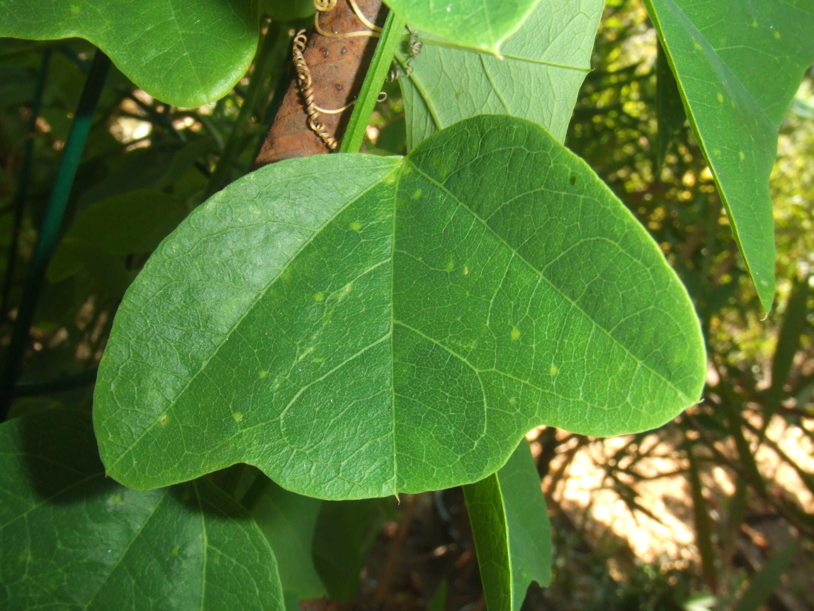 Blad van Passiflora biflora, Passiflorahoeve, Harskamp, Nederland